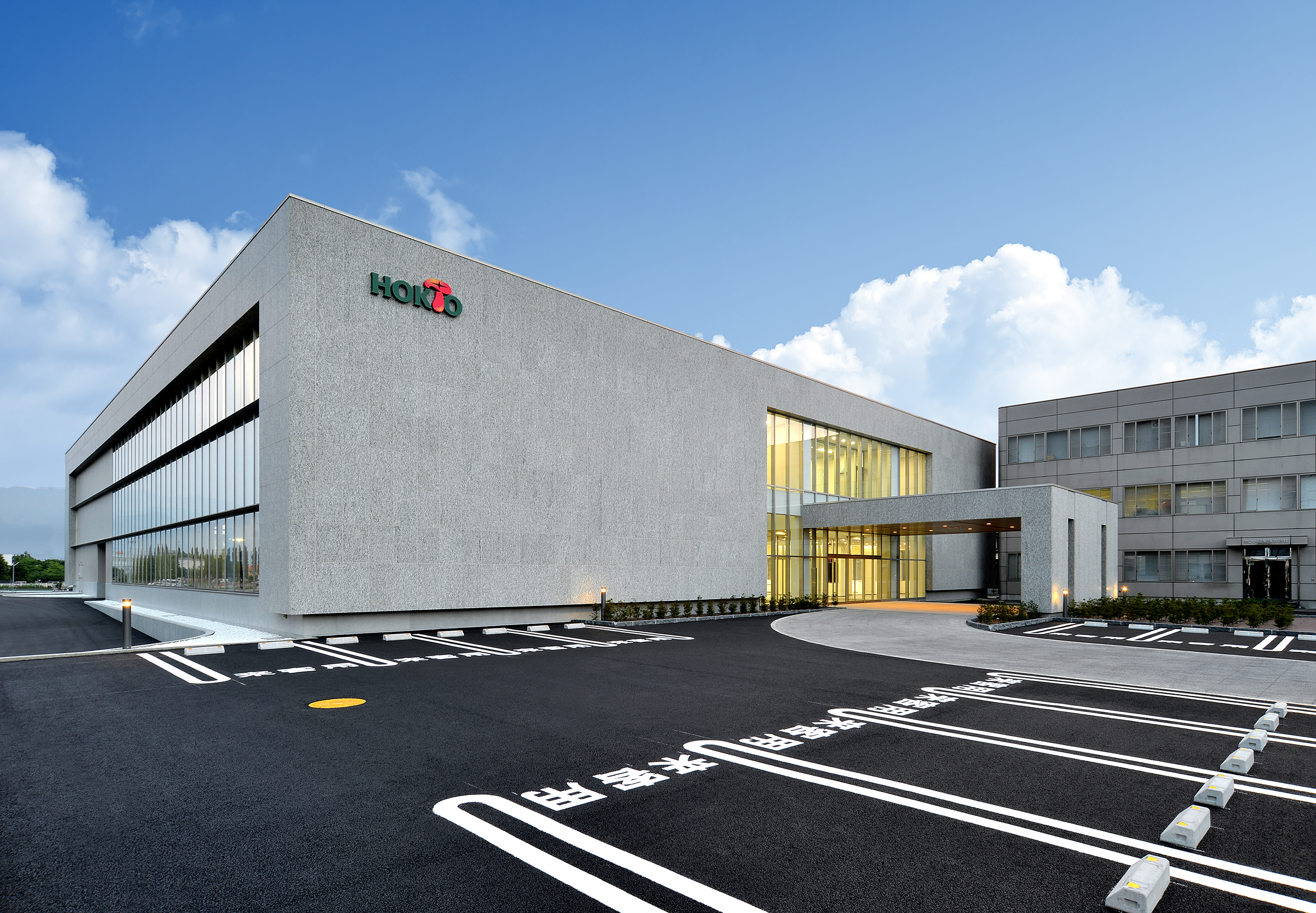 ホクト株式会社の新本社。